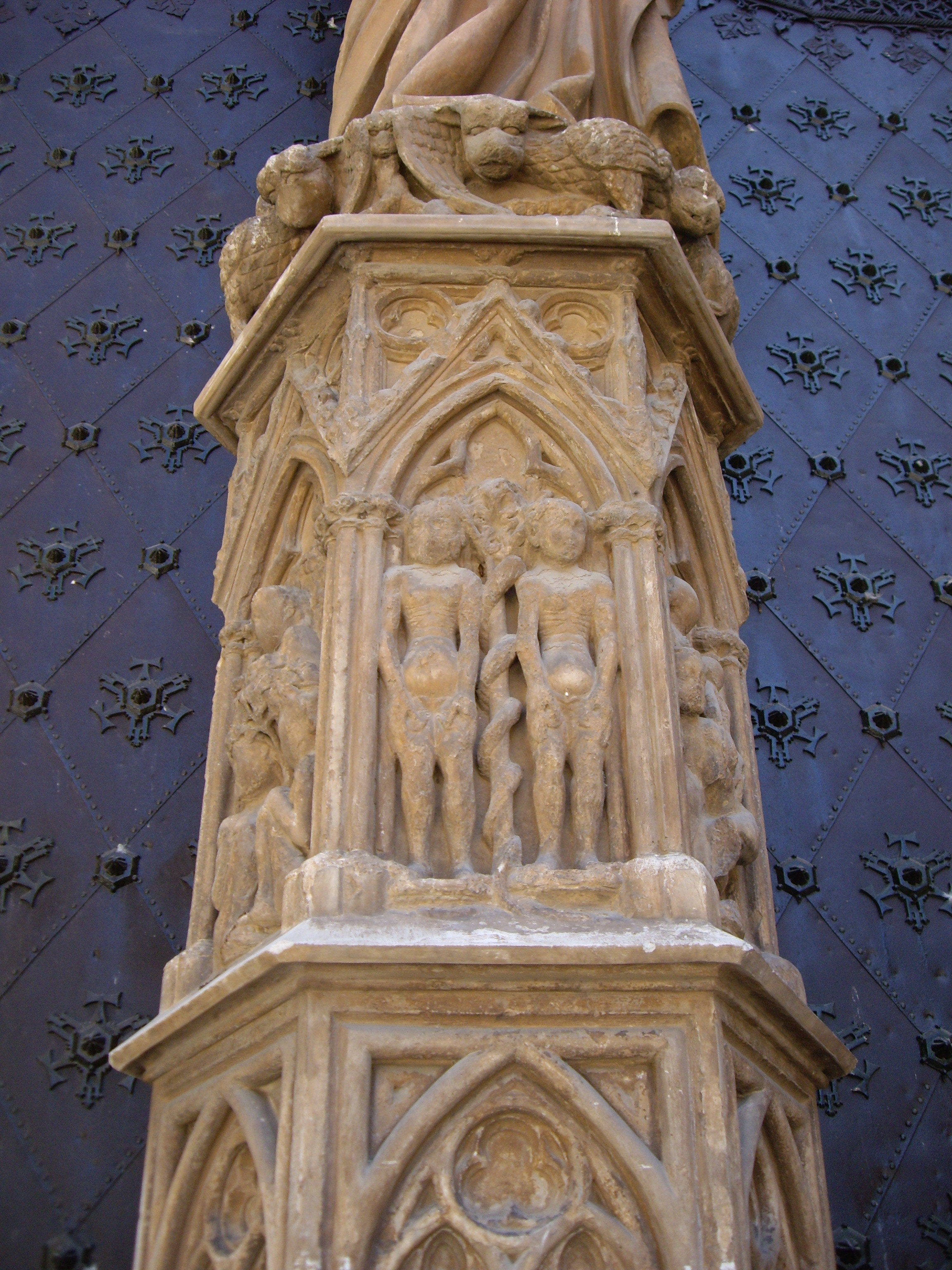 Relleu d'Adam i Eva a la portada principal de la Catedral de Tarragona, Tarragonés, Catalunya.